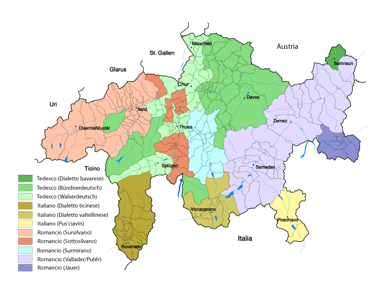 Lingue parlate nei Grigioni Categoria:Lingue della Svizzera